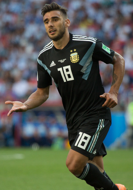 Месси и Ко не смогли обыграть неуступчивых исландцев